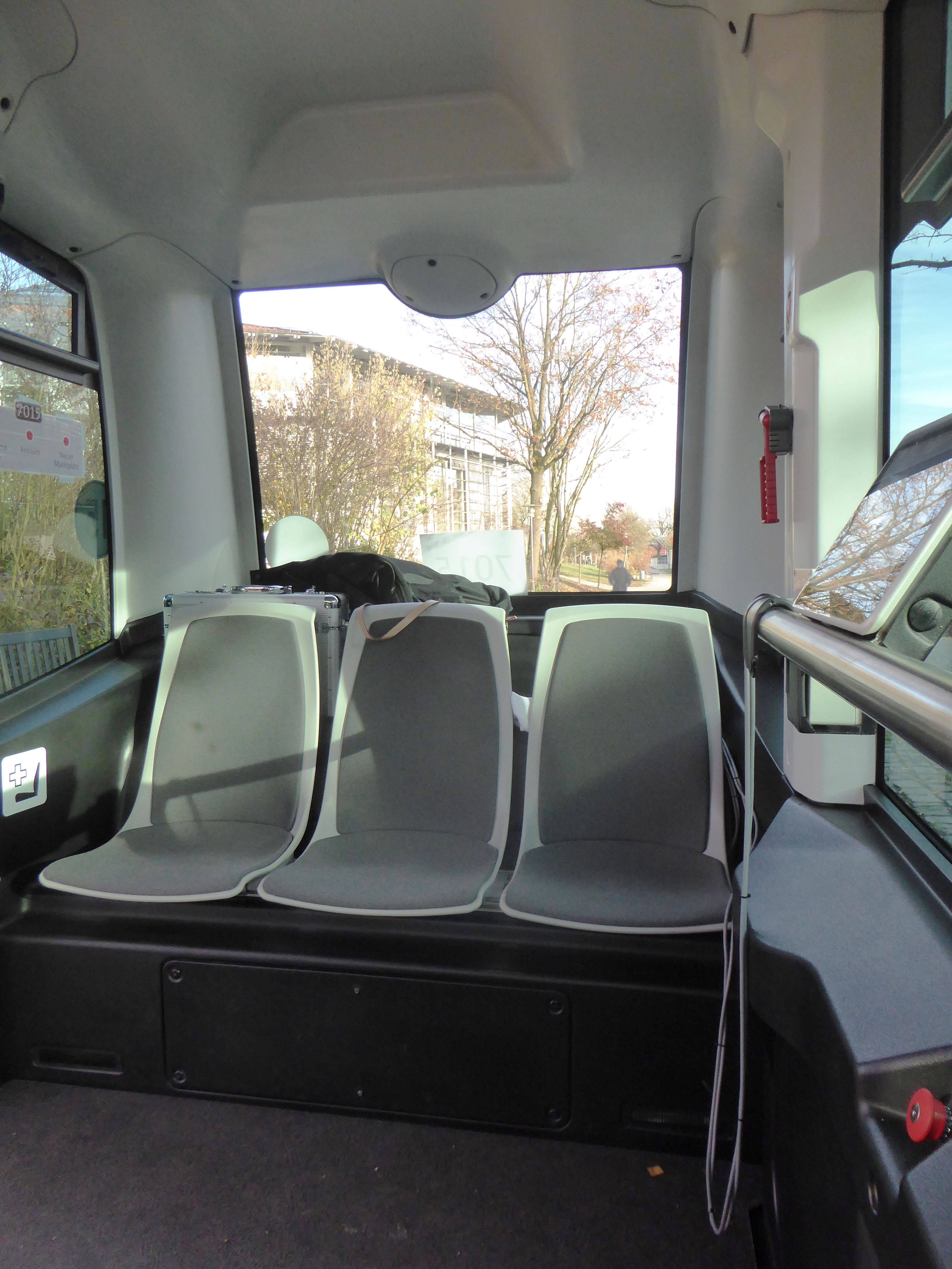 Bad Birnbach, selbstfahrender Versuchsbus, Innenansicht.